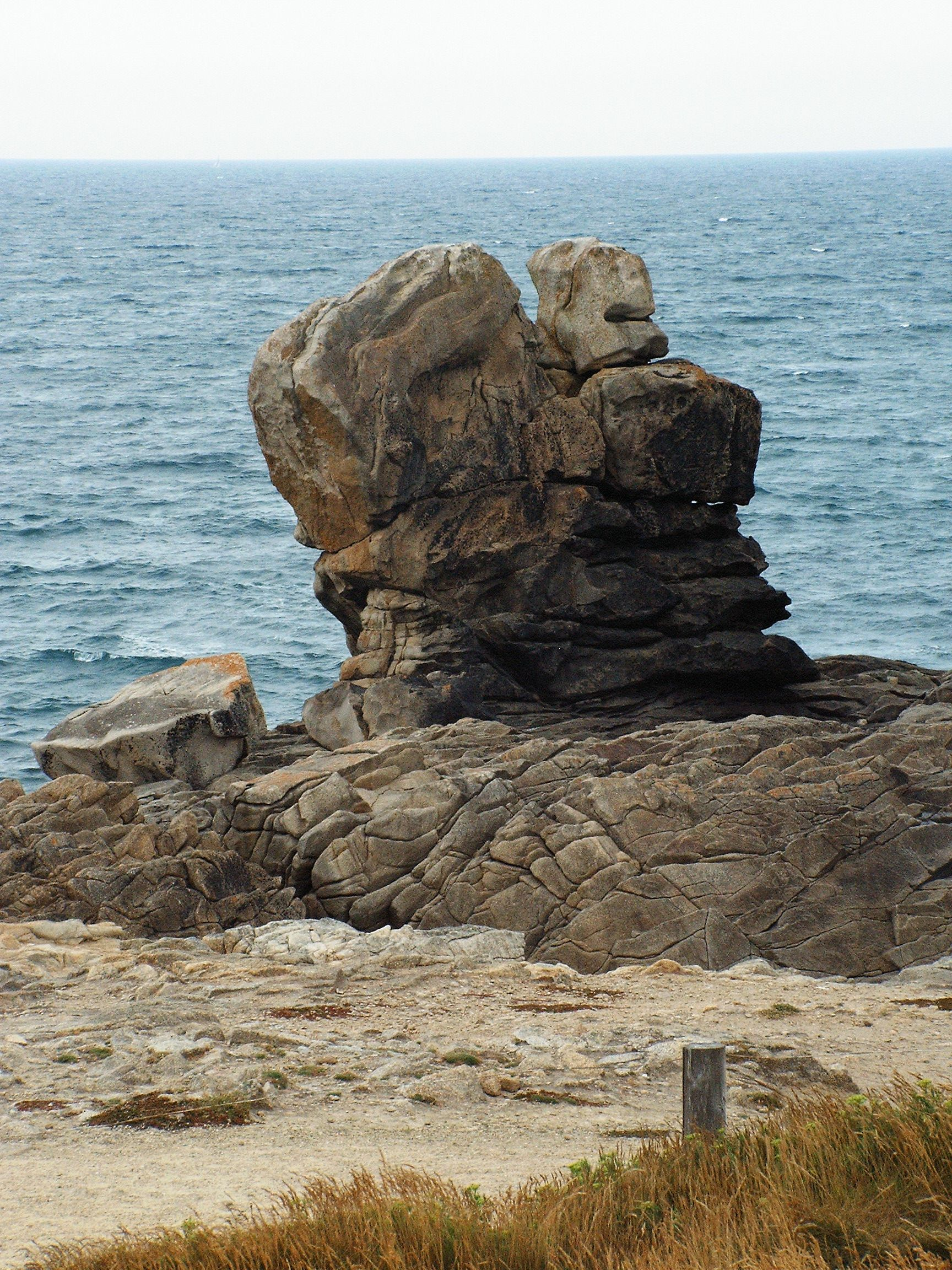 Felsformationen am Pointe de La Torch in der Bretagne